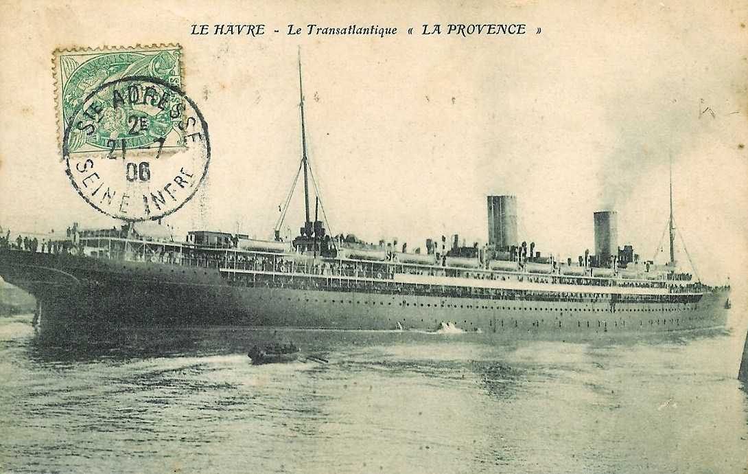 Paquebot La Provence en 1906.